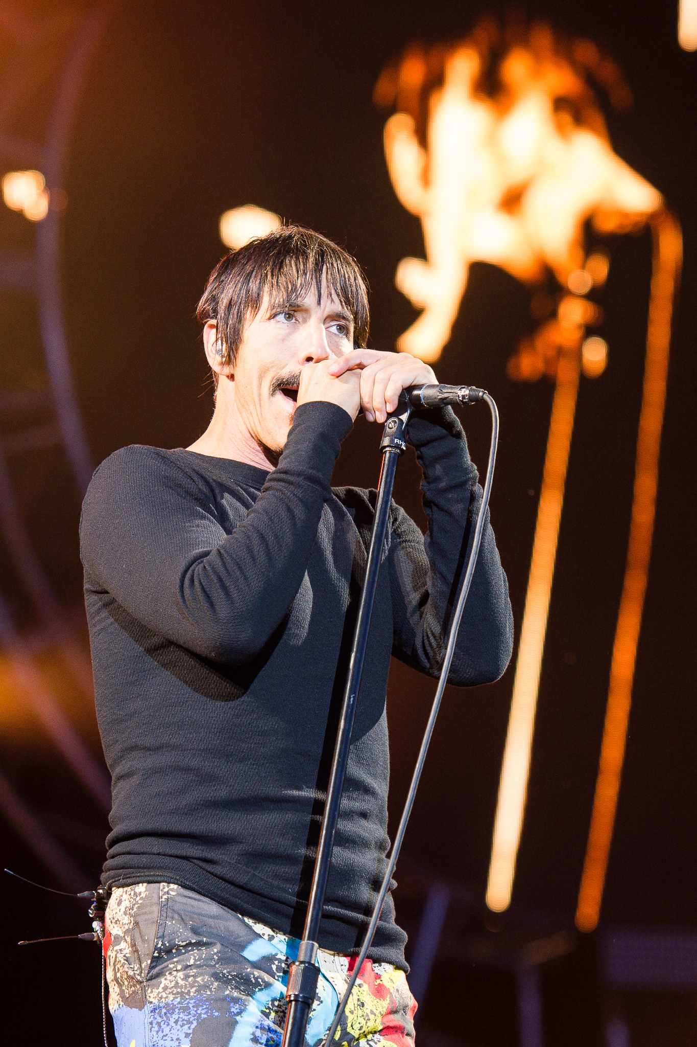 ARGO-Konzerte,Anthony Kiedis,Festival,Konzert,Livekonzert,Livemusik,Musik,Red Hot Chili Peppers,RiP,Rock im Park 2016,Seat Zeppelin Stage